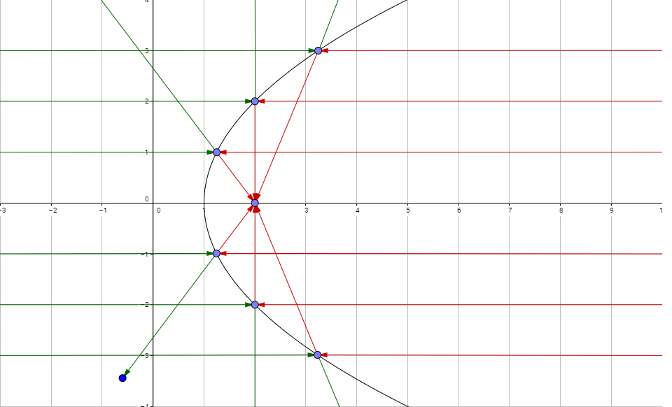 Descrizione del percorso dei raggi luminosi in uno specchio parabolico